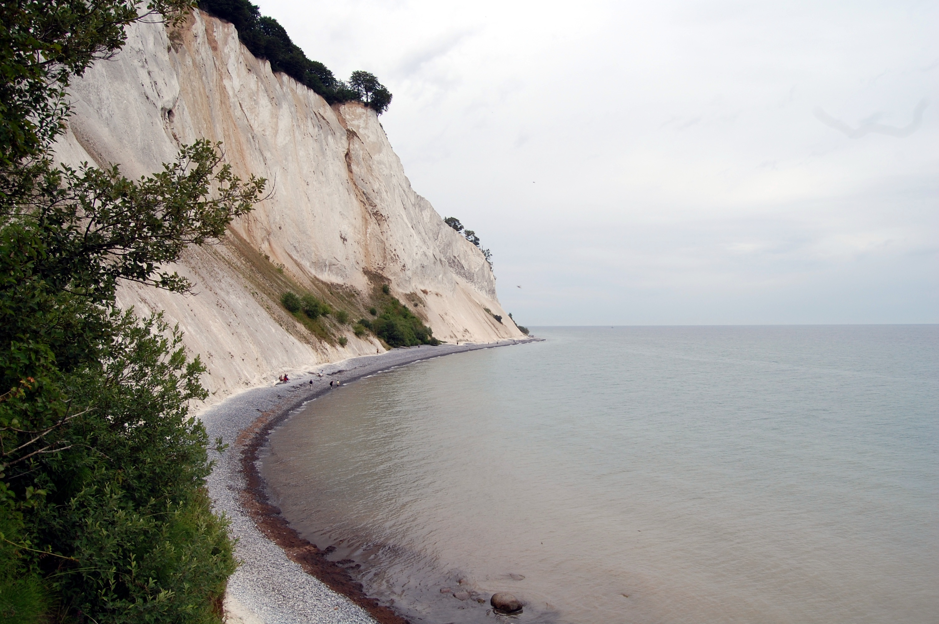 Mons Klint in Denemarken. Een 100 meter hoge kalk rots de eindigt in de Oostzee.